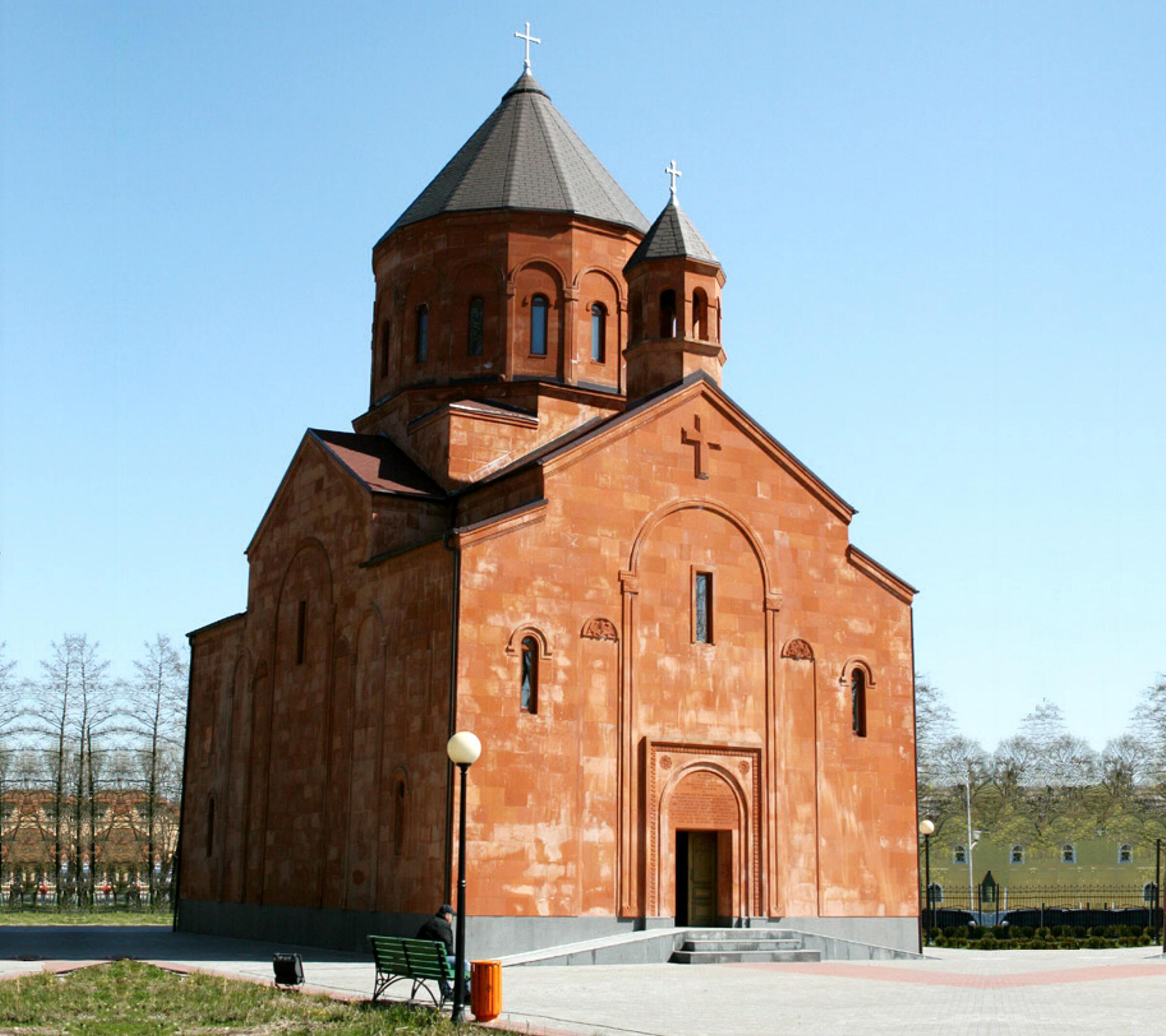 армянская церковь в Калининграде